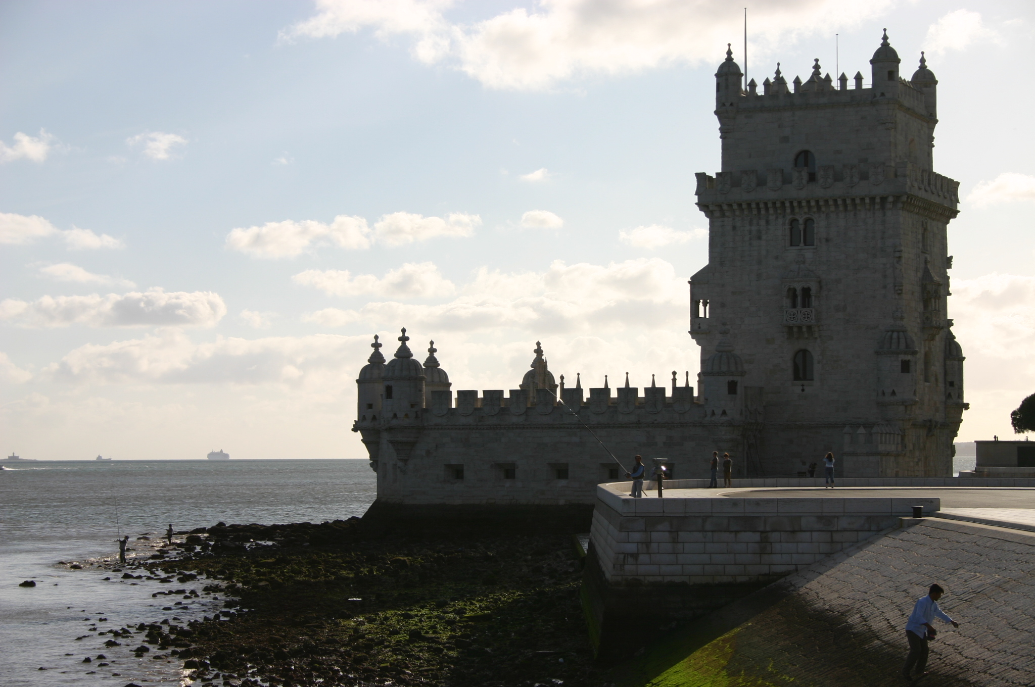 Torre de Belém, Lisboa. Belém Tower, Lisbon.